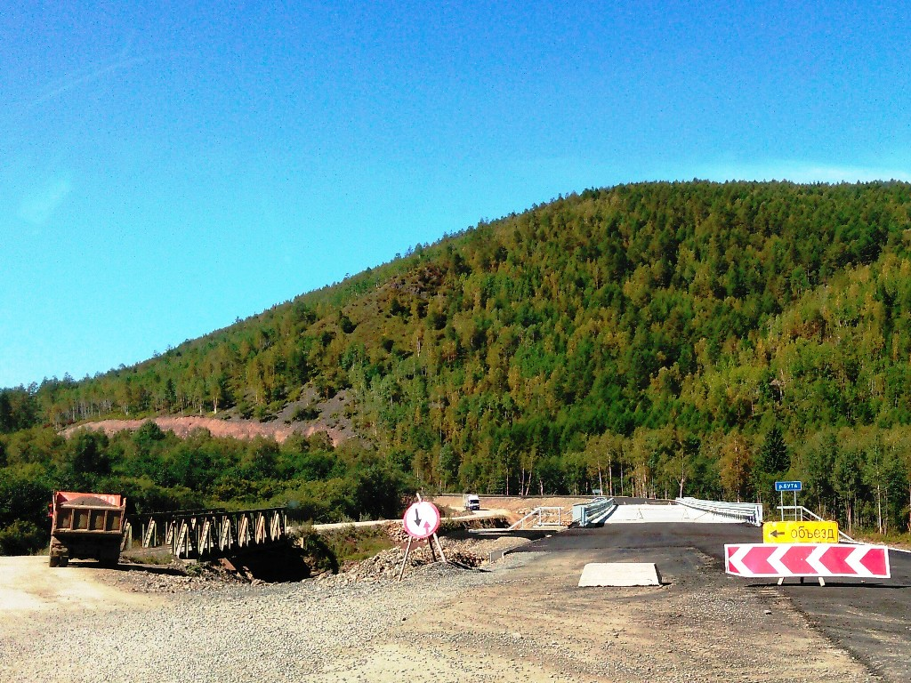 Автодорога Р454, участок Лидога - Ванино